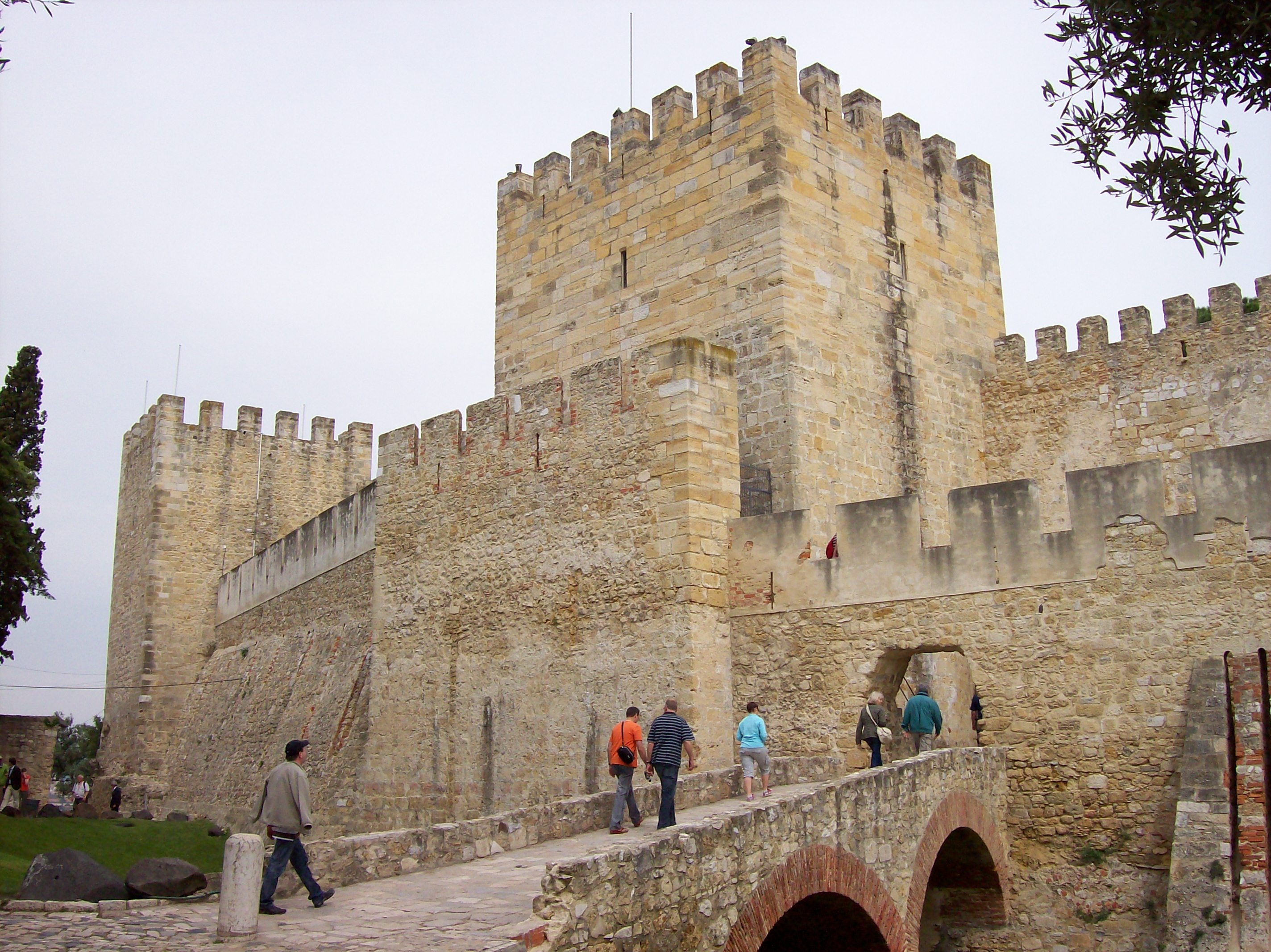 Castelo de São Jorge in Lissabon (Portugal)